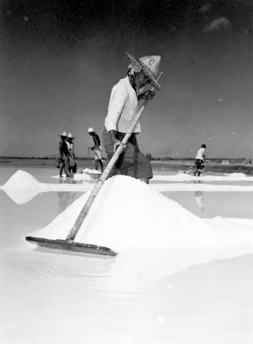 Repronegatief. Zoutwinning op Madura. Met een schoffel (sorkot) wordt het losgelaten zout op hopen geschoven zonder de ondergrond te beschadigen of het zout met aarde te vervuilen. De arbeiders die over de zoutdijken lopen doen het zout in manden